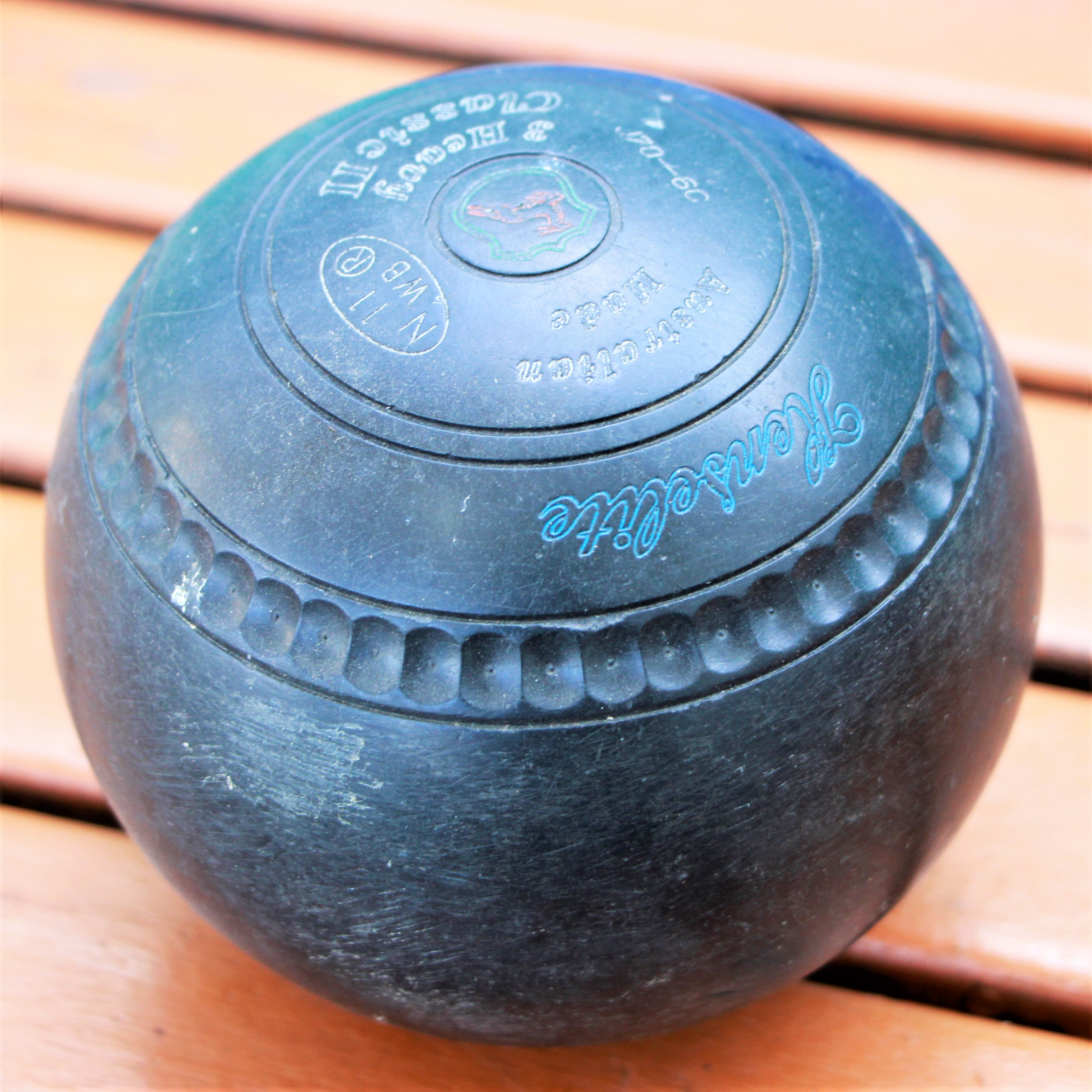 론볼의 볼 모습.